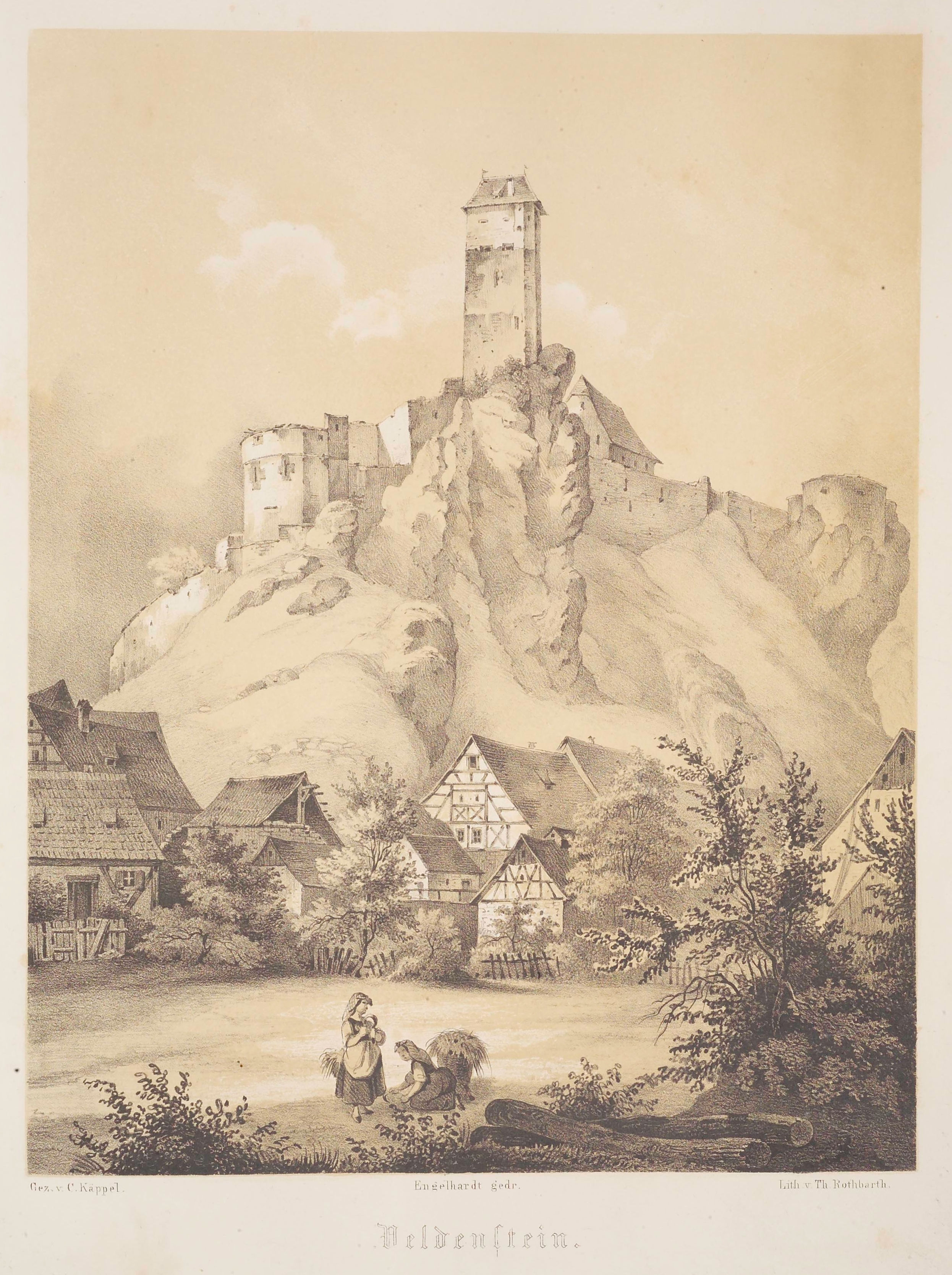 Burg Veldenstein in Fränkische Schweiz. Cyclus der der interessantesten Punkte aus der Umgegend von Muggendorf und Streitberg. Sechzehn in Ton gedruckte Lithographien. Nach Originalzeichnungen von C. Kaeppel lithographirt von Th. Rothbarth.